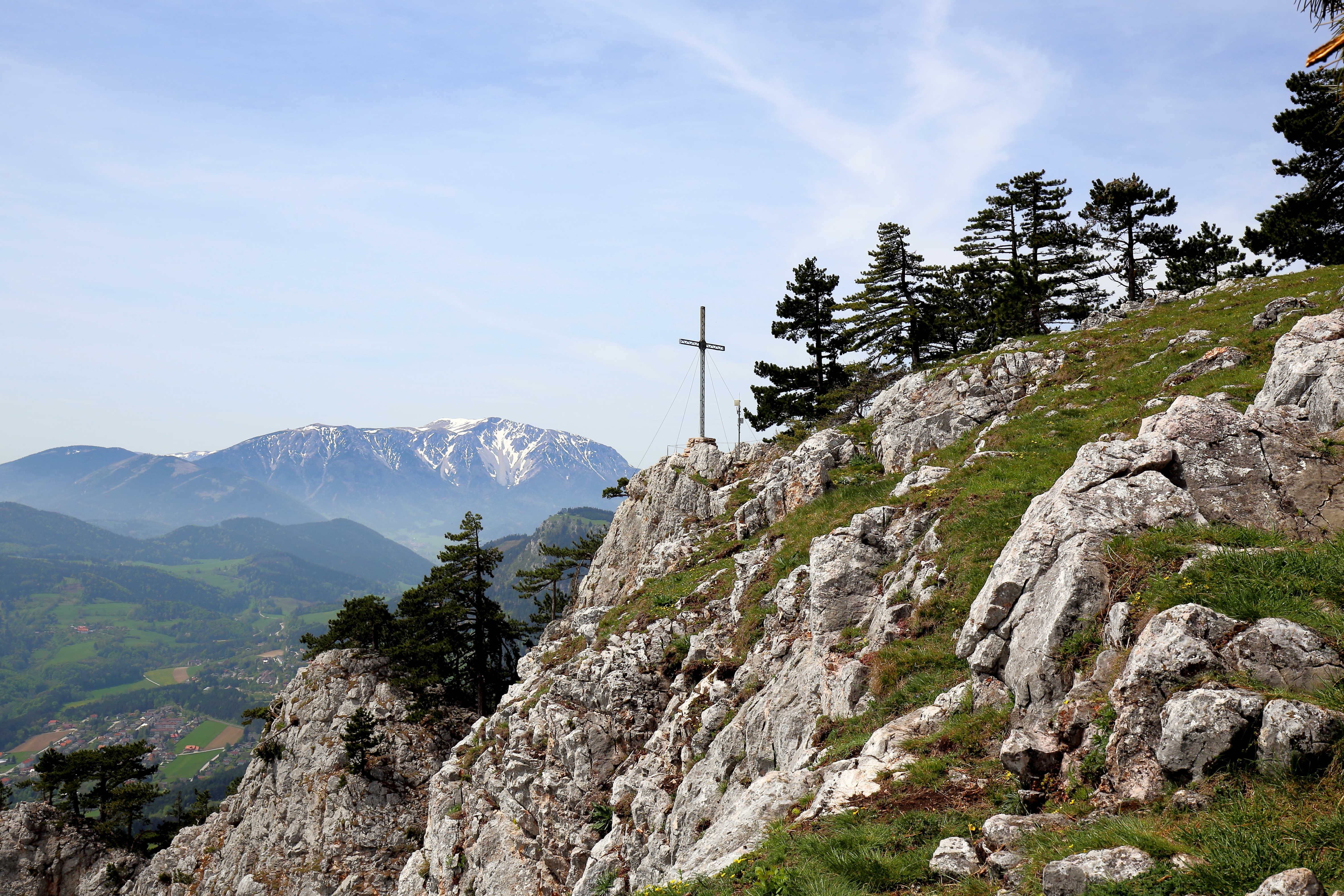 Der Ausstiegsbereich des Wagnersteiges auf der Hohen Wand. In der Bildmitte das Wildenauer-Gedenkkreuz auf der Großen Kanzel, links unten die Gemeinde Grünbach am Schneeberg und im Hintergrund der Schneeberg.